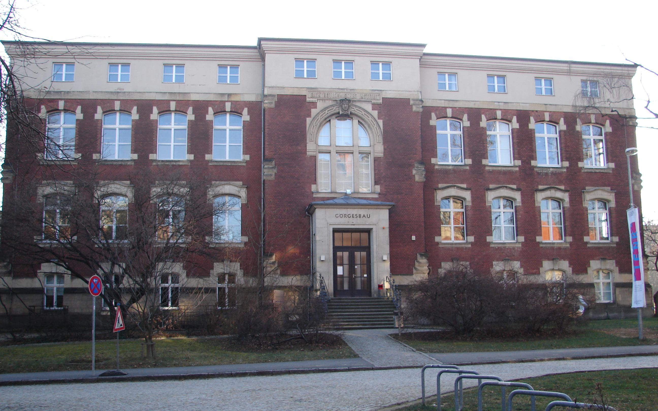 Görgesbau der Technischen Universität Dresden, Sitz des Universitätssammlungen Kunst+Technik